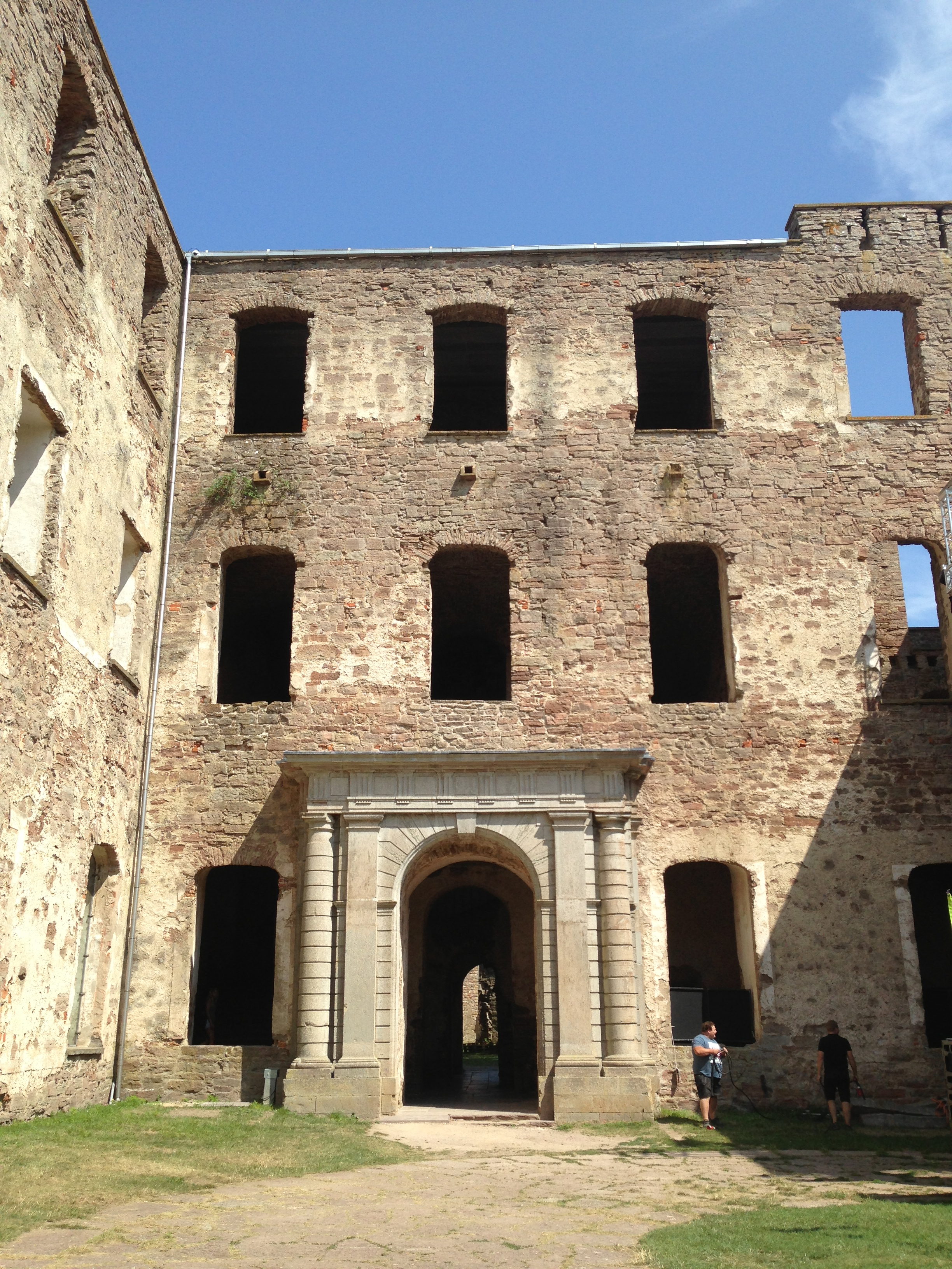 Borgholms slottsruin (Borgholm 8:16)